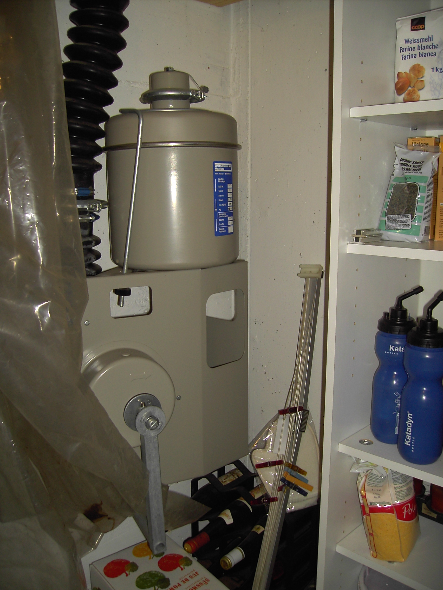 typische handbetriebene Filteranlage in einem Schweizer Einfamilienhaus. Luftschutzraum für 5 Personen.